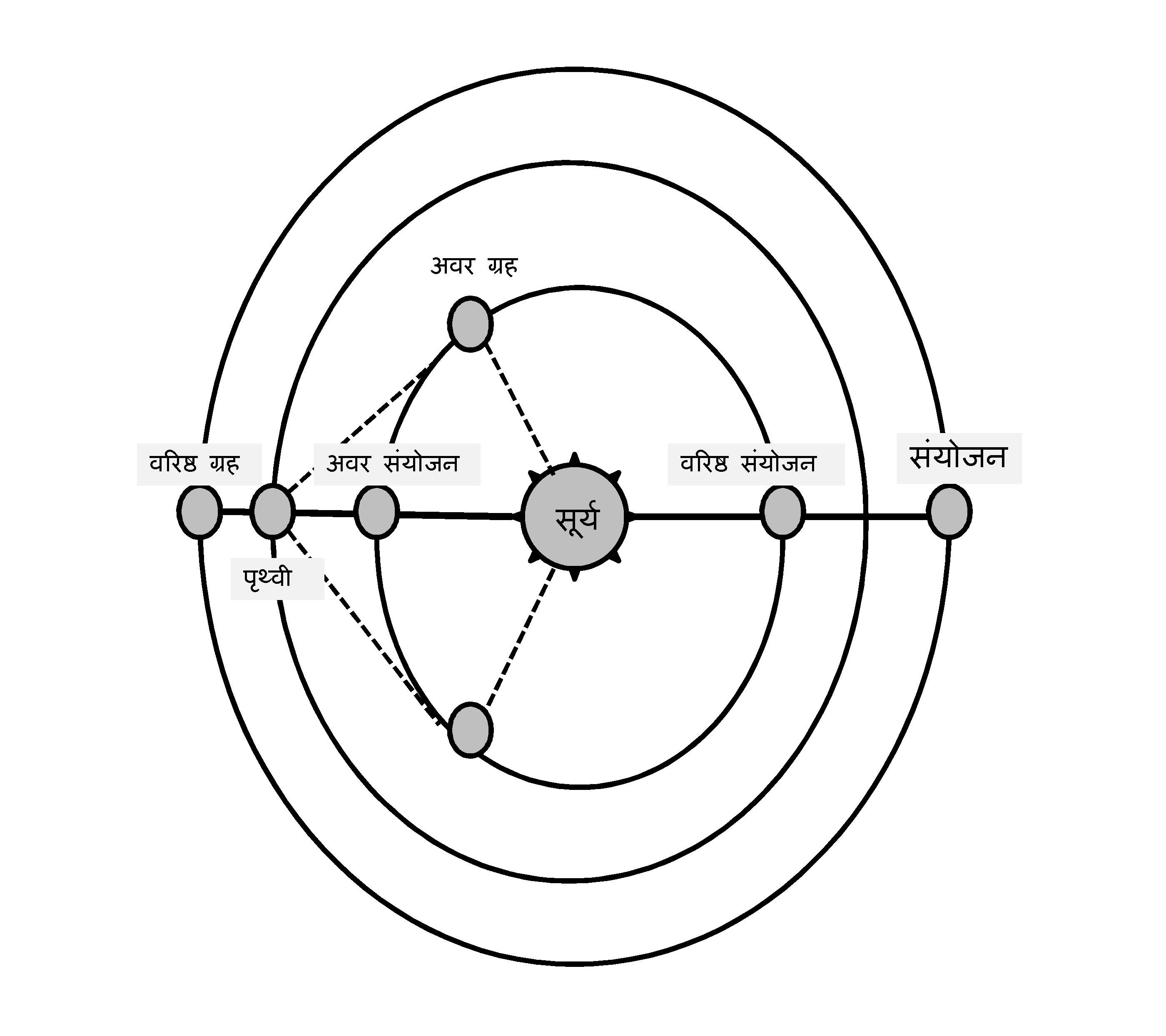 अवर और वरिष्ठ ग्रहों के संयोजन